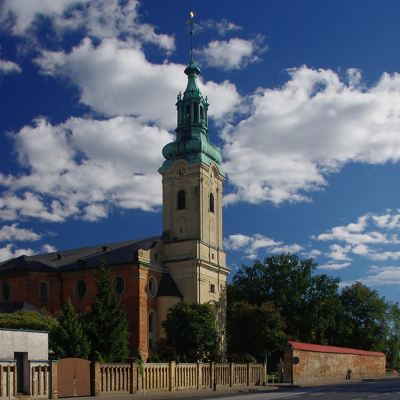 zespół d. luterańskiego kościoła Krzyża: kościół, obecnie rzymsko-katolicki parafialny pw. Świętego Krzyża z lat 1707-1715, 1792 r. Leszno, pl. Metziga 19 (zabytek nr rejestr. 832/1/Wlkp/A)